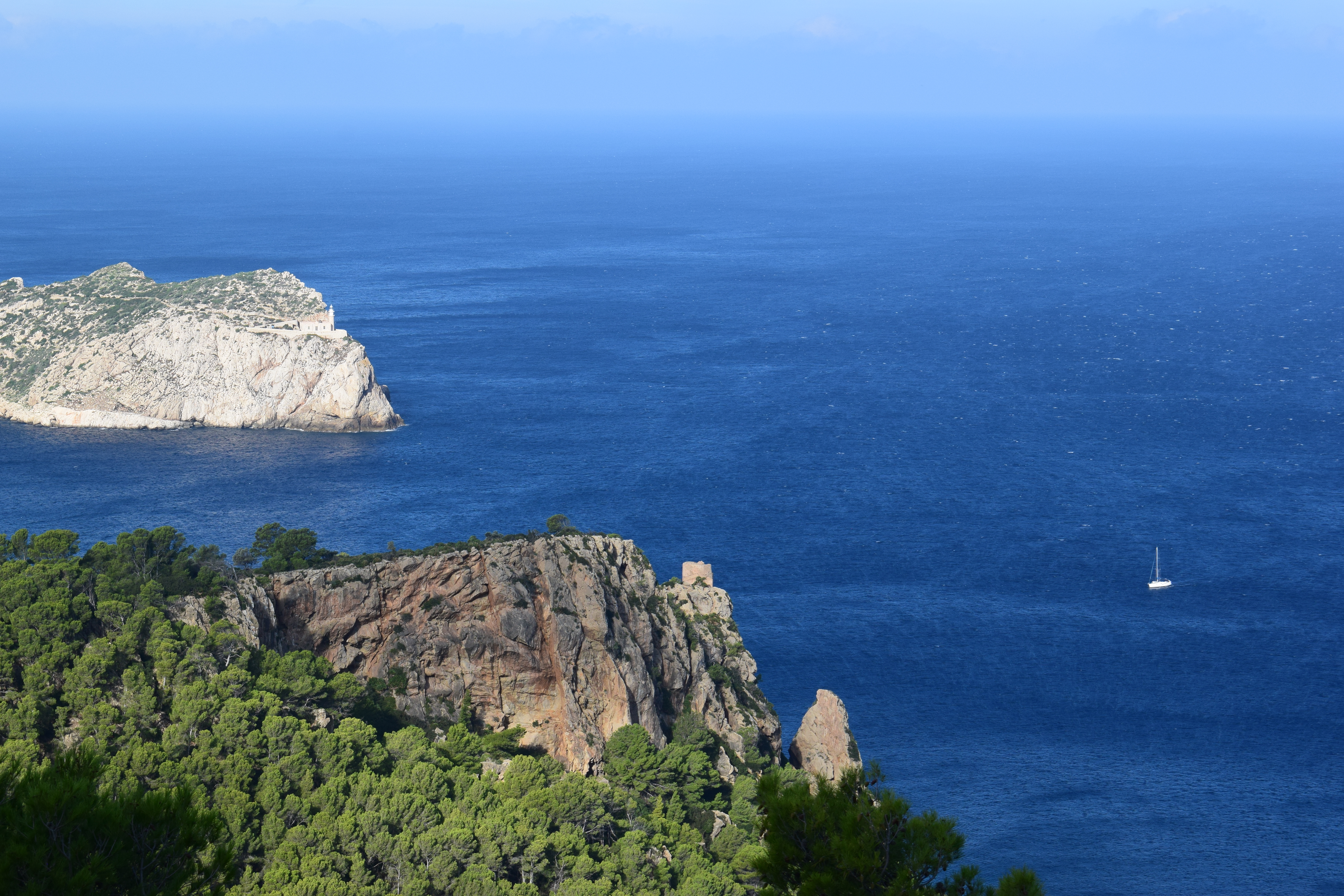 Mallorca: Torre de Cala en Basset bei Sant Elm und Far de Tramuntana auf Sa Dragonera; dazwischen die Meerenge Canal des Freu.